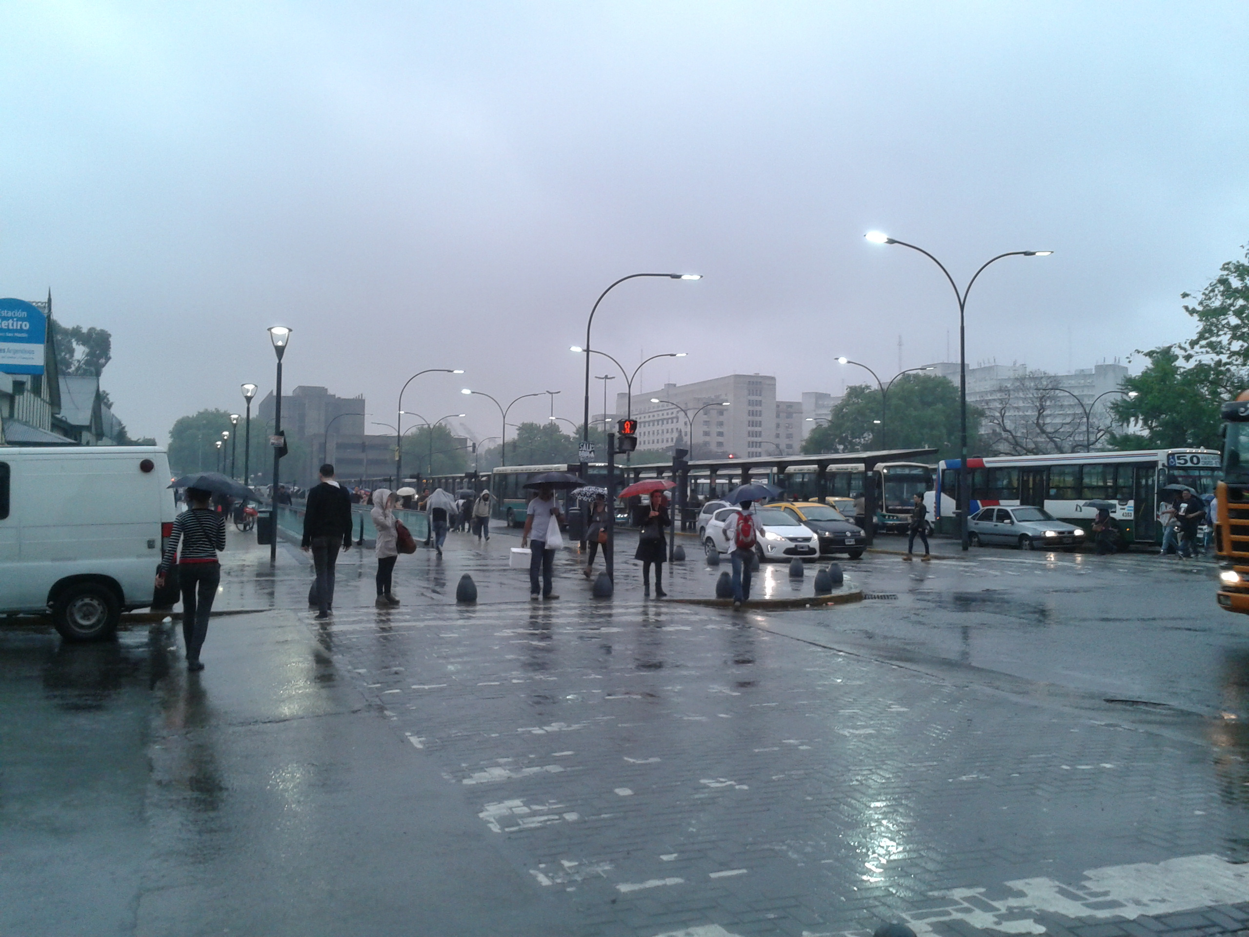 Frente a la estación del Ferrocarril San Martín